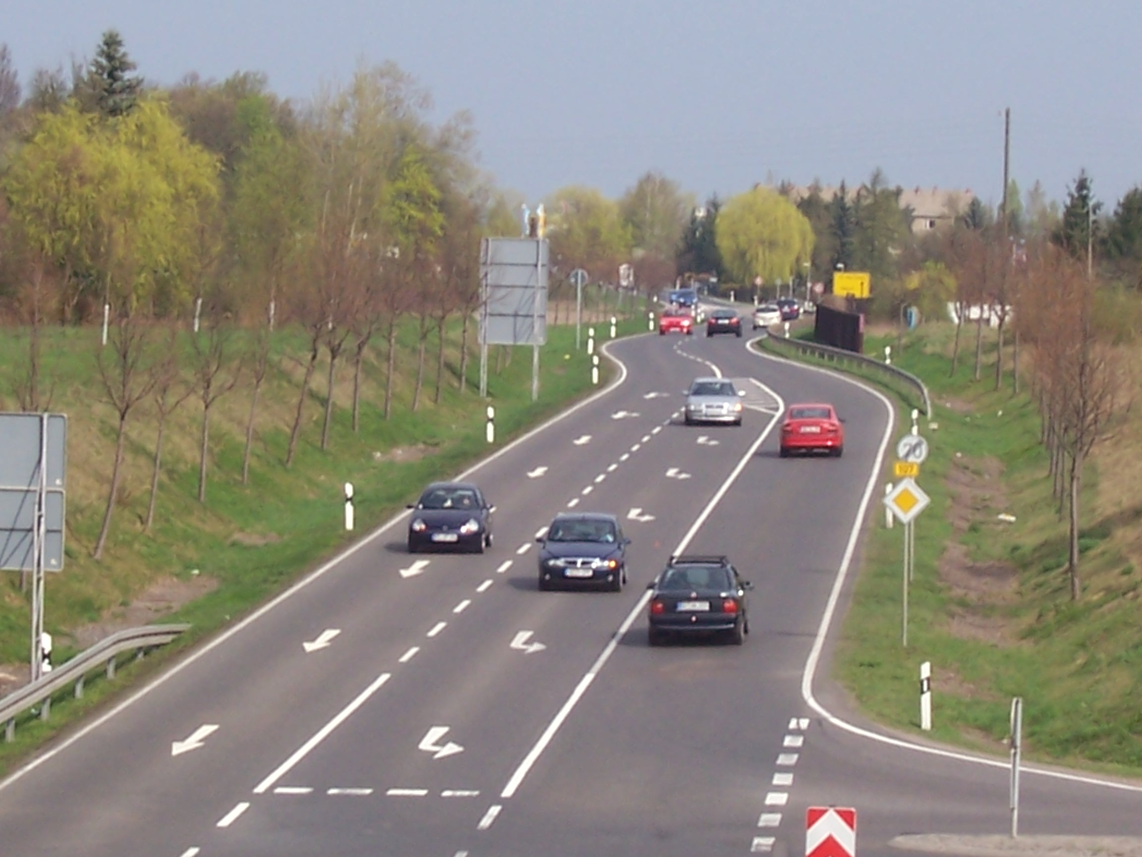 Bundesstraße 107 in Eilenburg Richtung Bad Düben